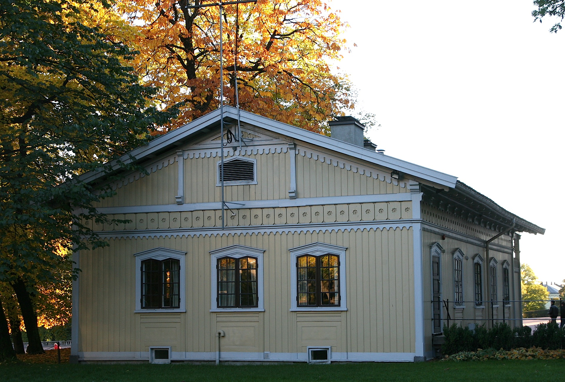 Vaktstue Slottet, Oslo